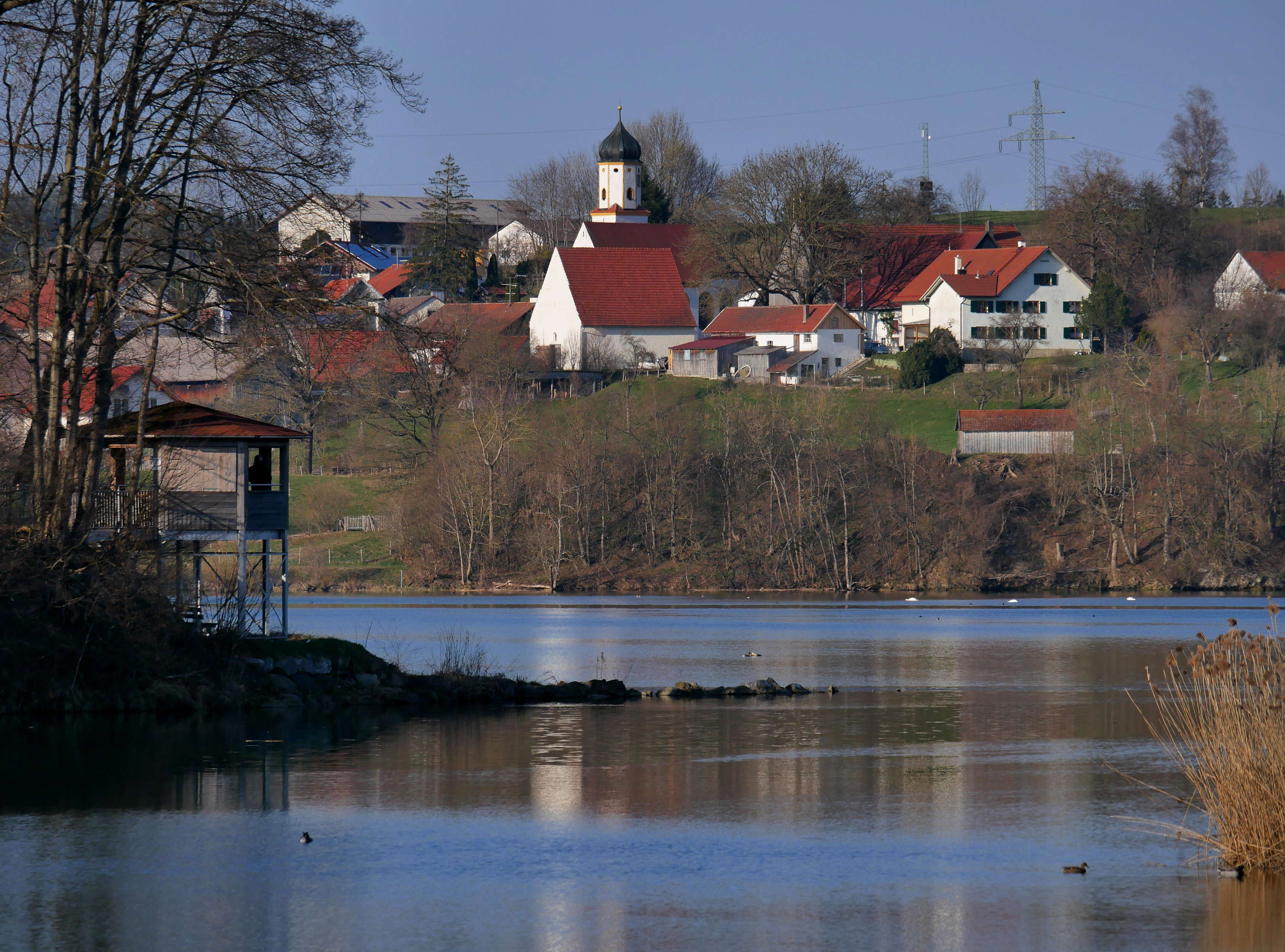 Landschaftsschutzgebiet / Vogelschutzgebiet Kardorfer Illerstausee Vogelbeobachtungsstation links und Kardorf mit Kirche St. Nikolaus dahinter